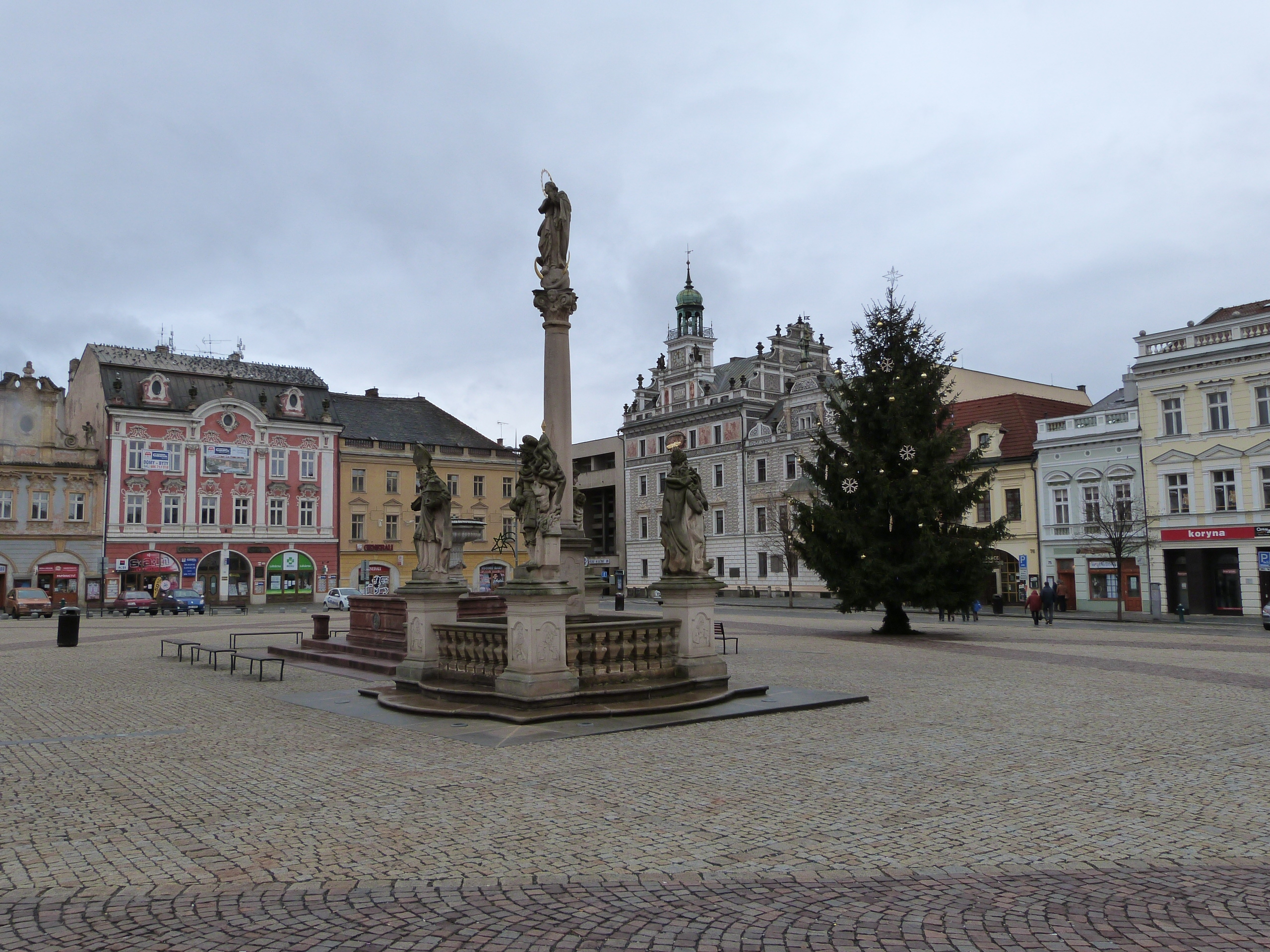 Karlovo náměstí v Kolíně, morový sloup